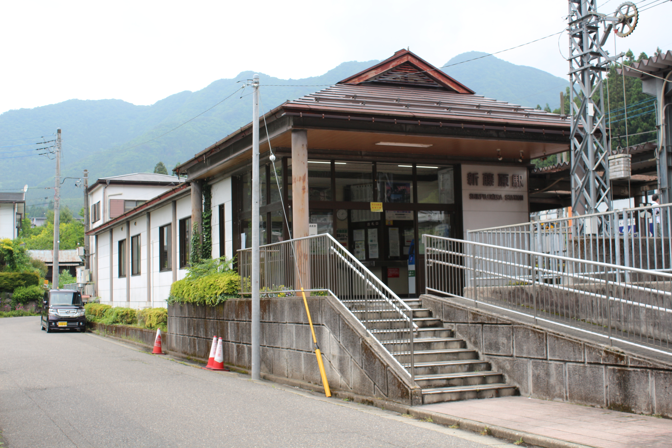 野岩鉄道会津鬼怒川線新藤原駅